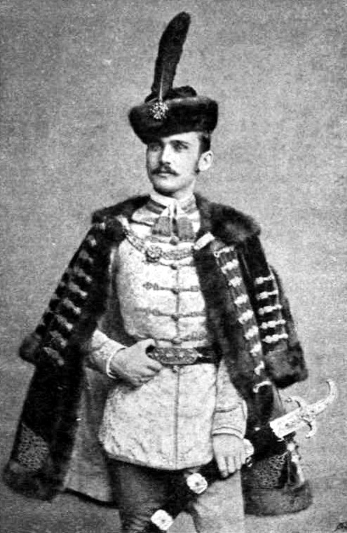 gróf Lónyay Elemér (1863–1946) portréja. Mándy Ferenc (román királyi és udvari fényképész) felvétele (1900)